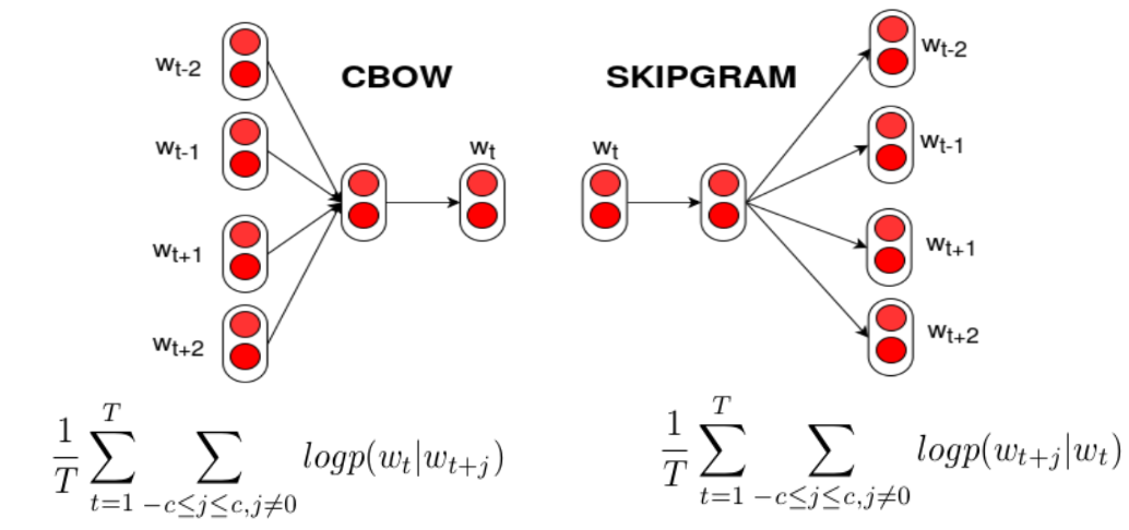 Word2vec algorimoak erabiltzen dituen bi ereduen irudia